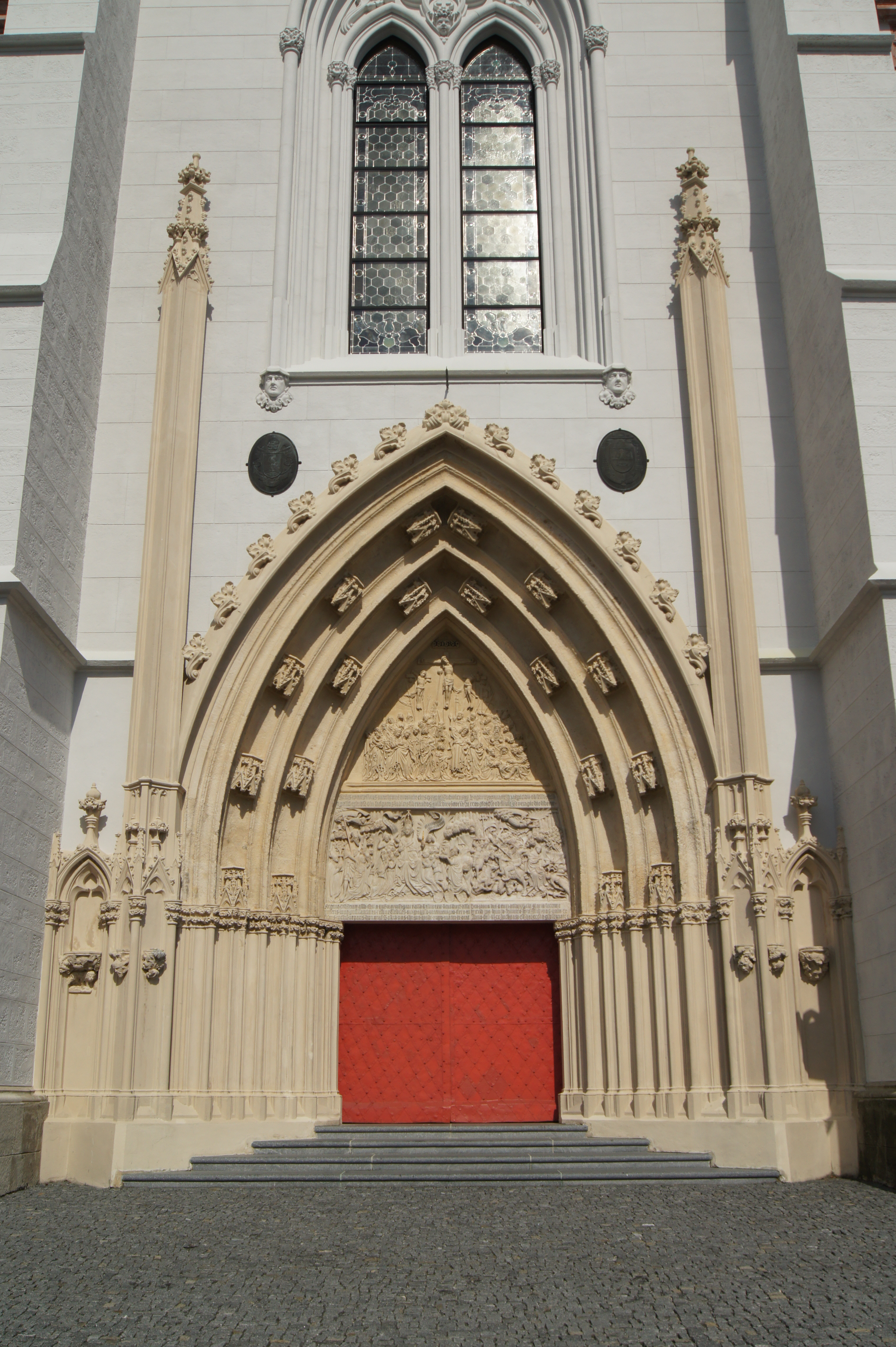 Basilika Minor, Pfarr- und Wallfahrtskirche Maria Geburt mit Kirchhof